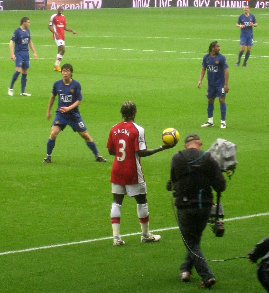 Sagna przygotowujący się do wybicia piłki z autu w meczu z Manchesterem United